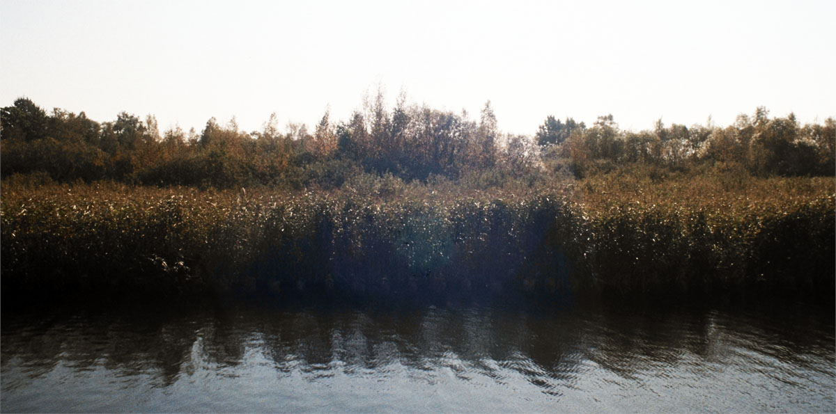 brzeg kanału Mioduńskiego